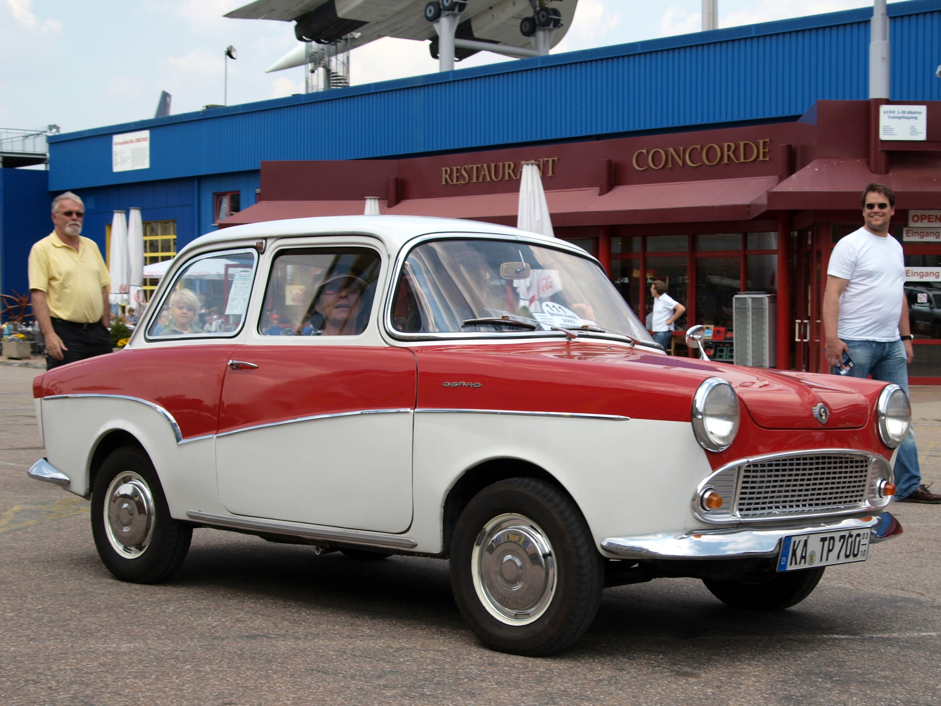 Photographed at the Technik museum Sinsheim, Germany. Participating in the Kurpfalz-Klassik rund um die 1. Tankstelle der Welt.